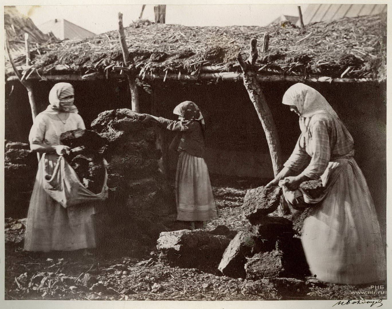 Казачки сносят кизяки в катух (сарай). Цымлянская станица. 1875-1876 Unknown